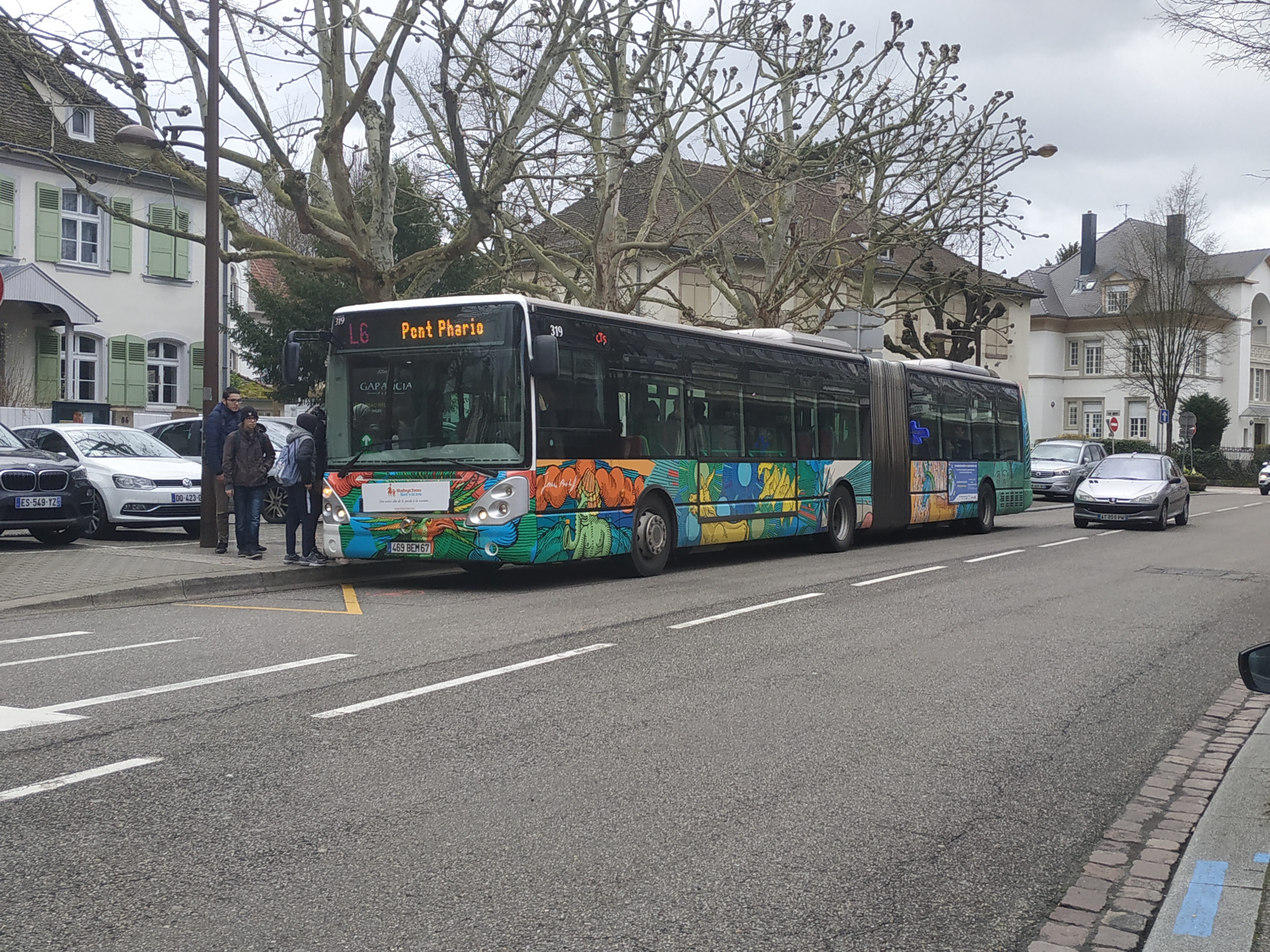 Irisbus Citelis 18 n°319 sur la ligne L6, dans le quartier de la Robertsau Strasbourg